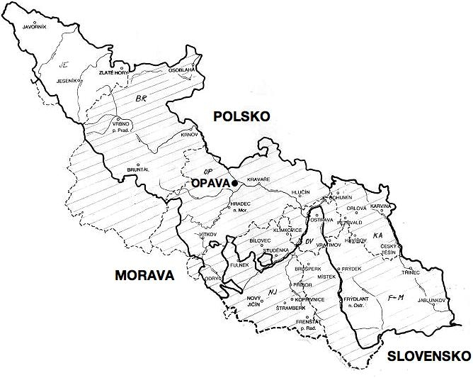 Mapa Českého Slezska (tučně je vyznačena hranice Českého Slezska; šrafovaně je vyznačeno území moderního Moravskoslezského kraje se stavem před 1. lednem 2005. Tučnou přerušovanou čárou je vyznačena jižní hranice bývalých moravských politických okresů začleněných do Slezské expozitury země Moravskoslezské).